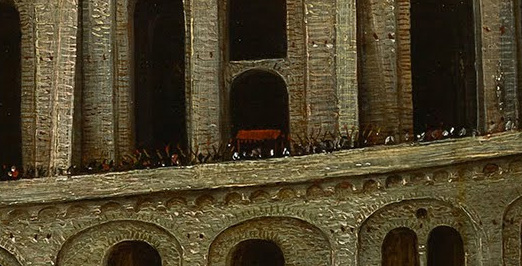 Detail aus Pieter Bruegels Turmbau zu Babel in Rotterdam: Eine kirchliche Prozession zieht nahe der Bildmitte die Rampen hinauf